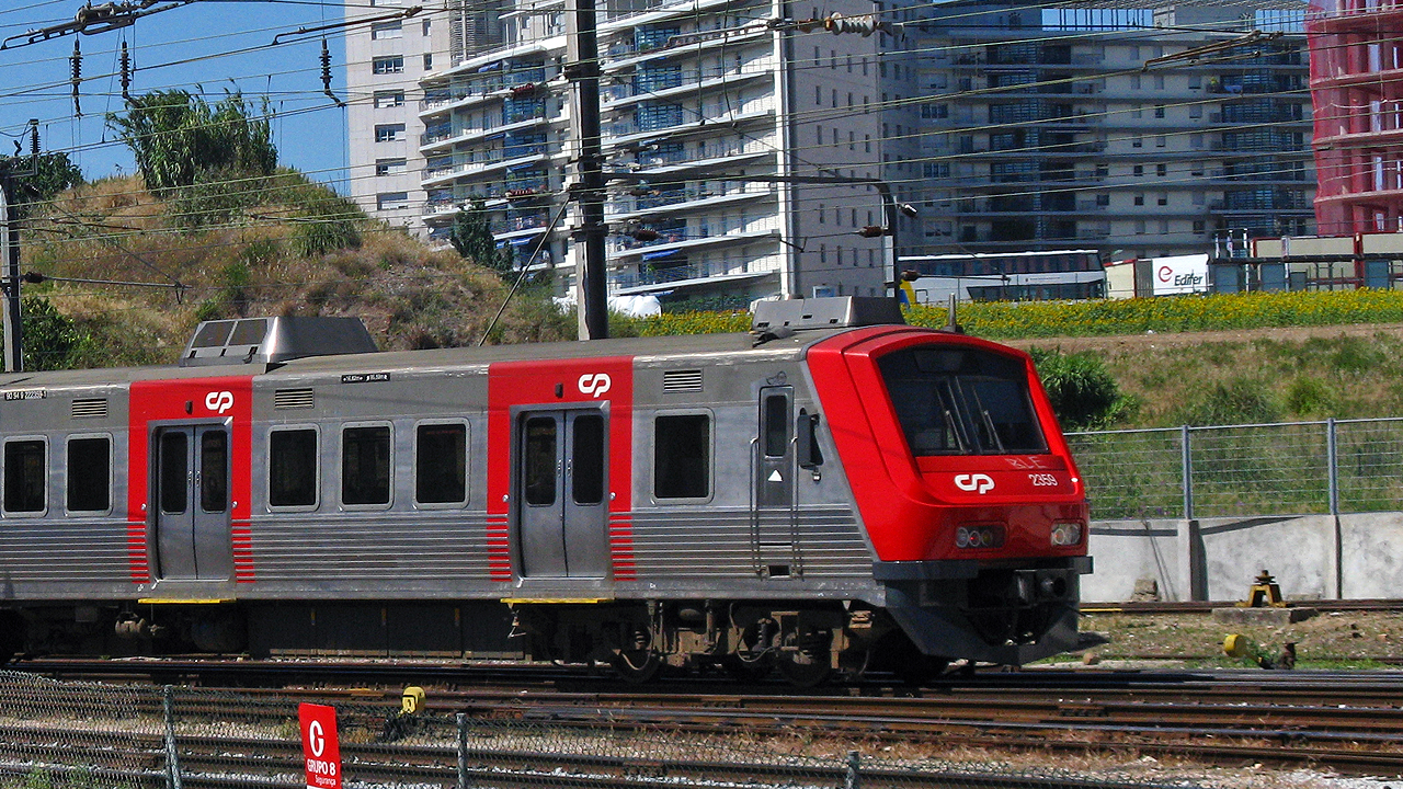 Motora 2359 da UQE 2309 Campolide 07/07/2009